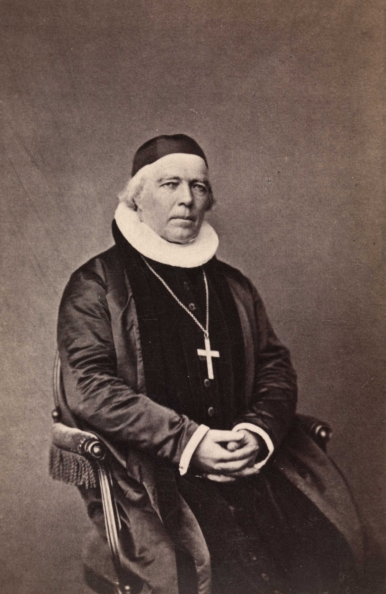 Jens Mathias Pram Kaurin, portrett, mann, biskop, prestekjole, kalott, sittende knefigur.